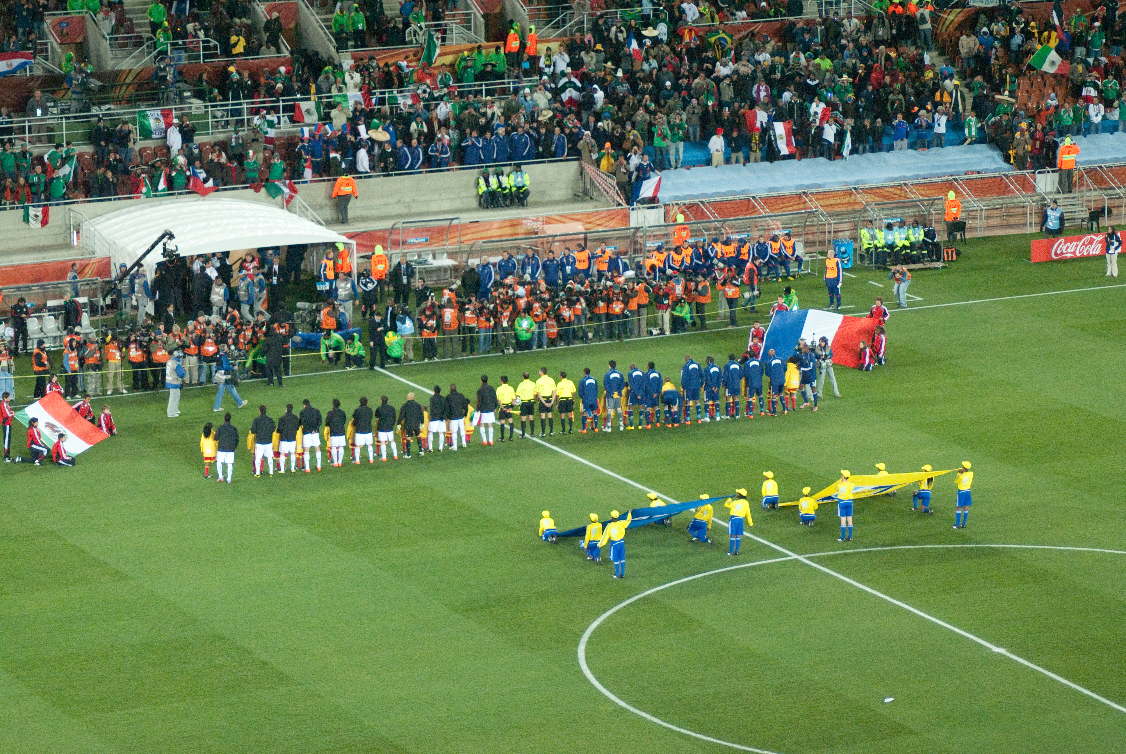 Hymnes